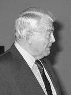 Freiburg im Breisgau: Henri Nannen bei der Verleihung des Gödecke-Parke-Davis-Preises